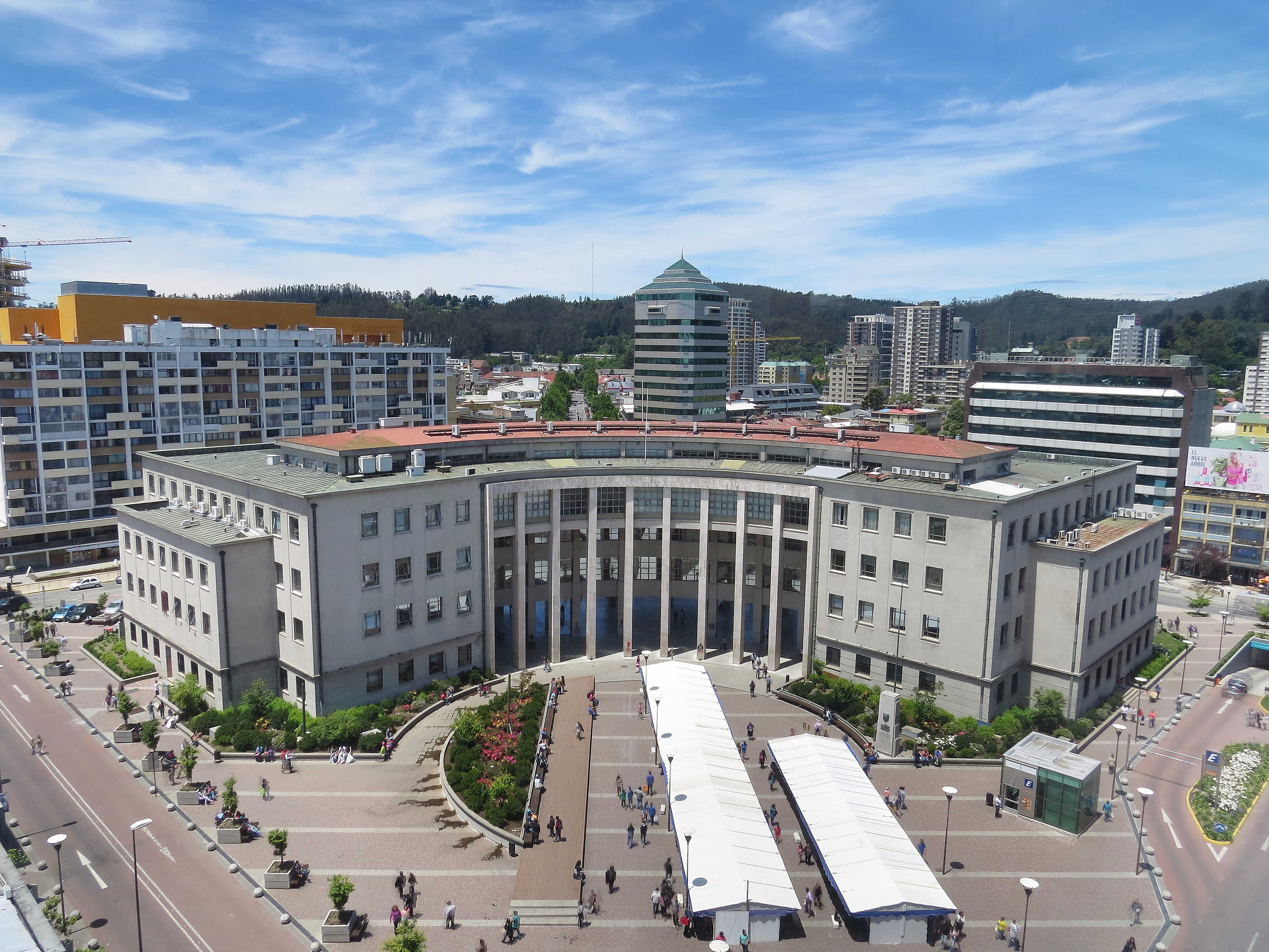 Edificio de los Tribunales de Justicia de Concepcion